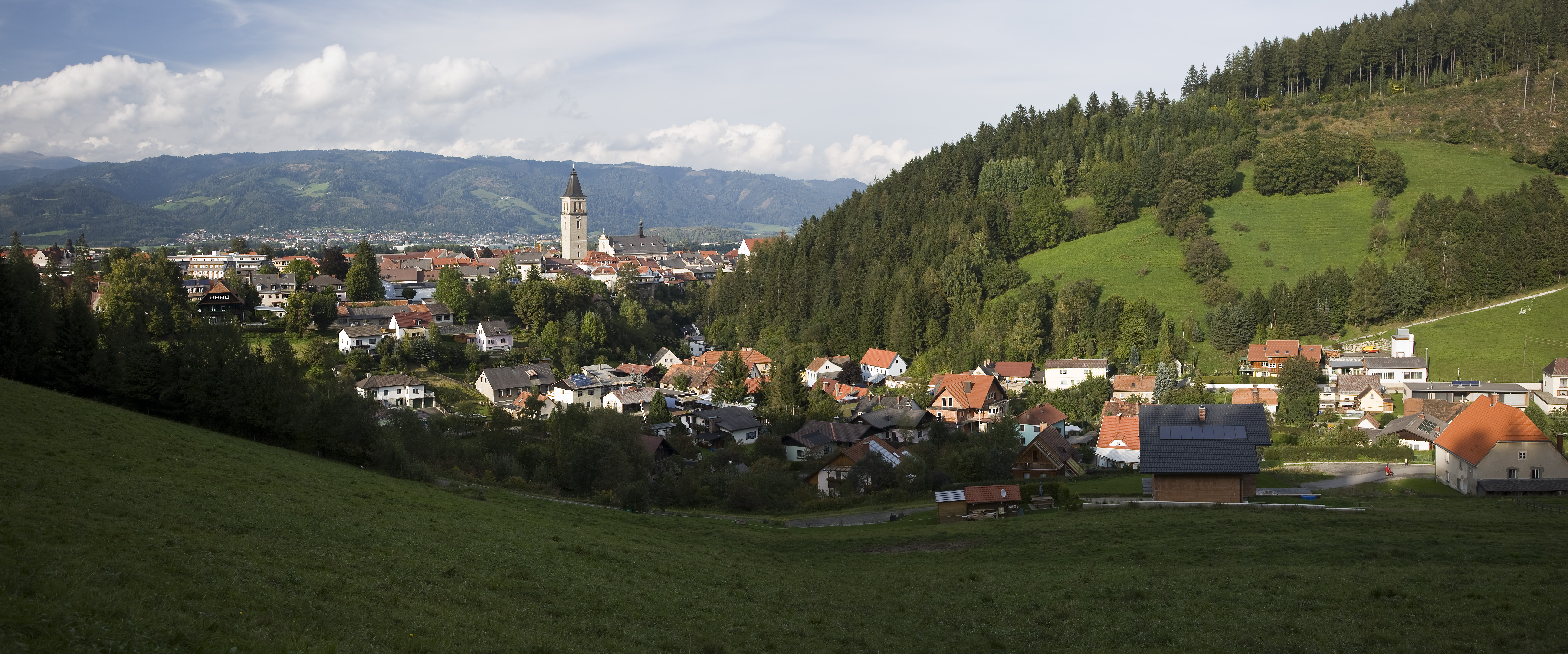 Die Stadt Judenburg vom Ortsteil Reifling aus gesehen